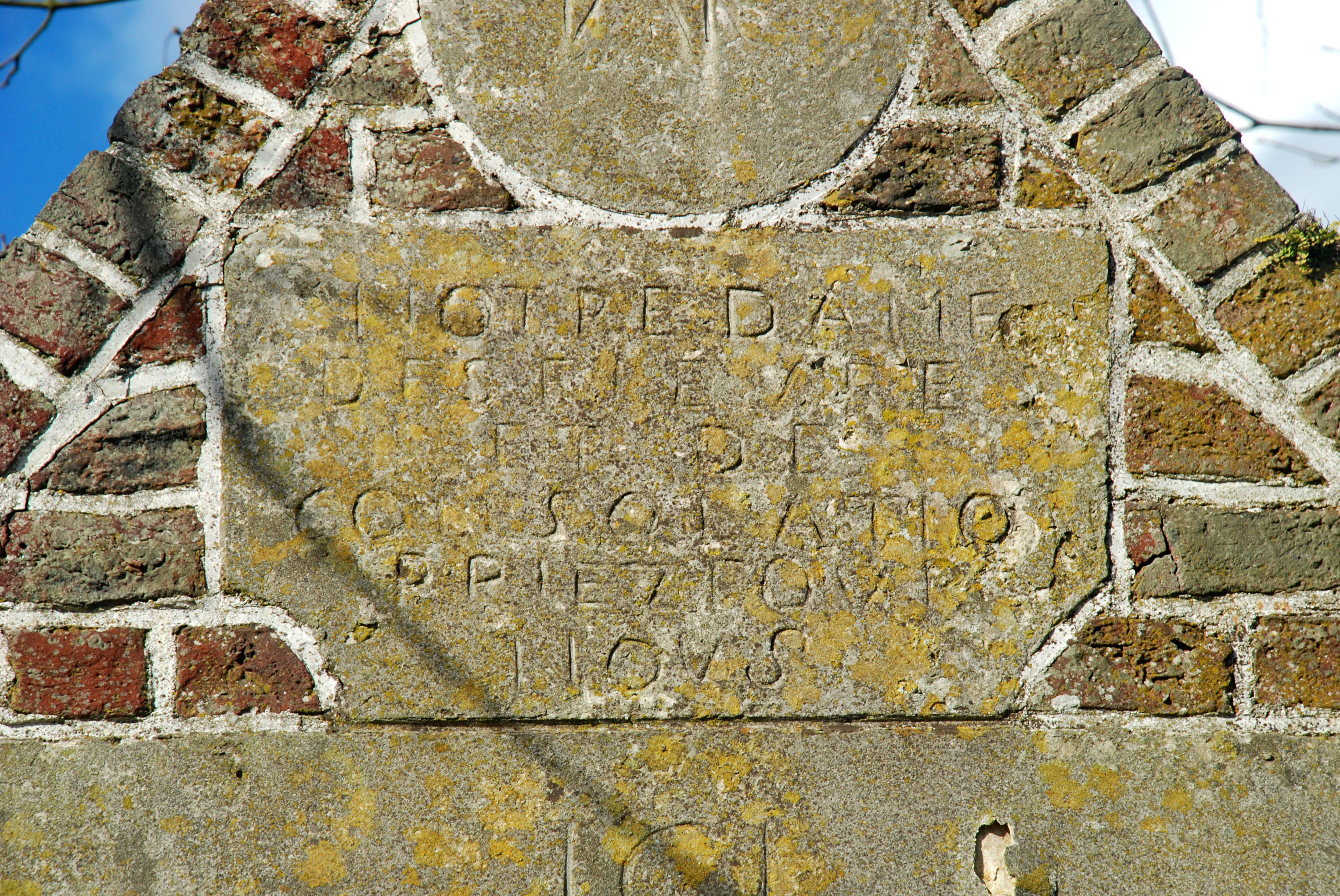 Belgique - Brabant wallon - Ottignies - Manoir de Franquenies